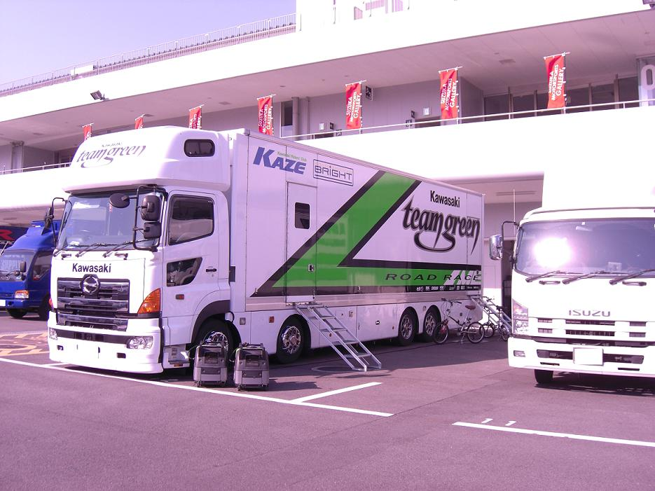 カワサキトレーラー 鈴鹿